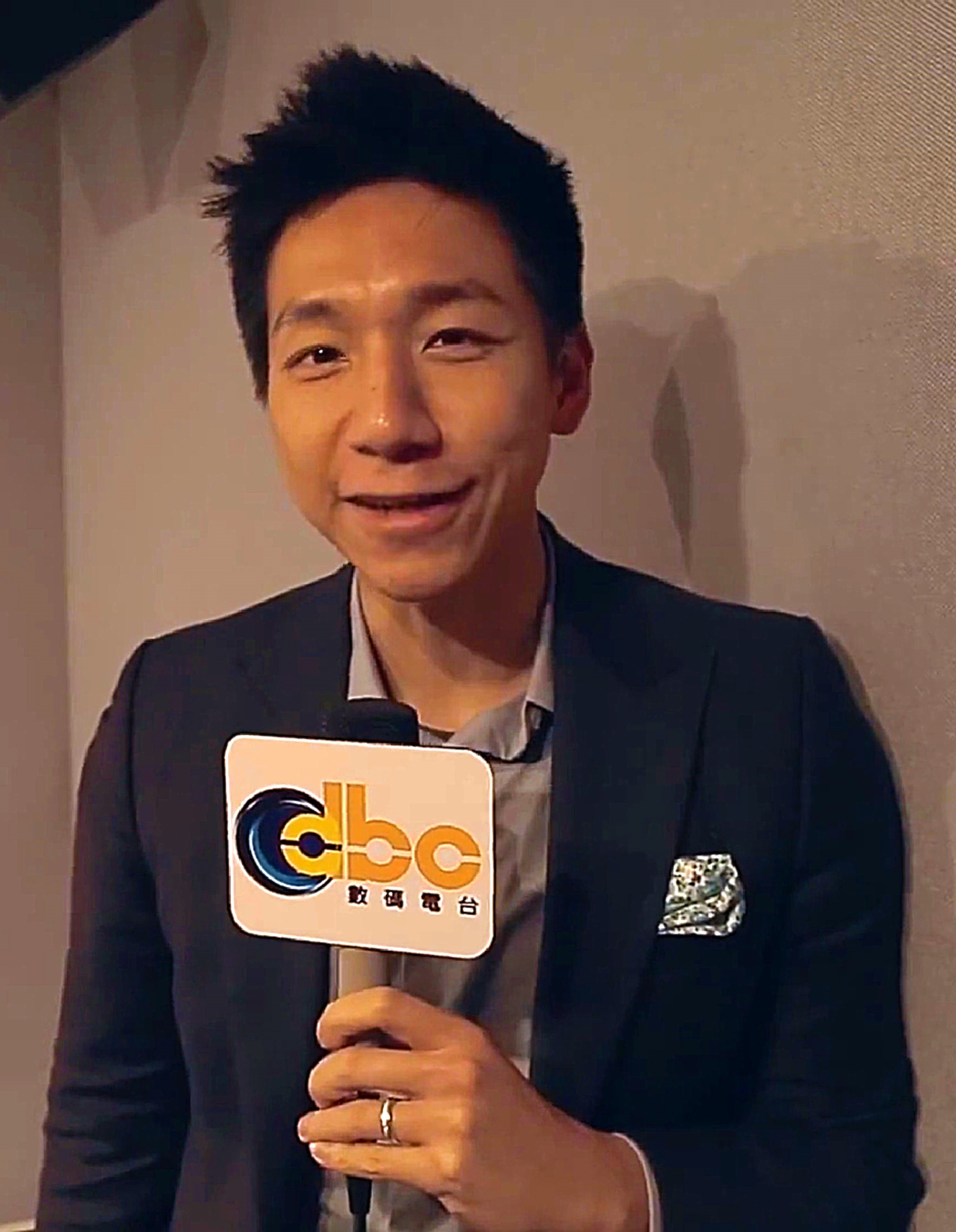 香港傳媒人，曾任無綫電視新聞部主播，2010年辭職轉向從事環境保育、保障動物權益和經營幕後製作生意